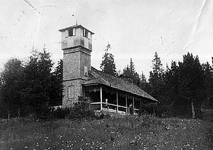 Притулок на пер. Околе. Ймовірно, серпень 1939 р.